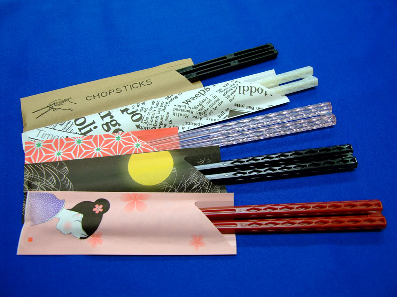 合成樹脂で作られた割り箸。使用後は回収して粉砕し、再生する。